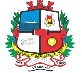 Brasao de Santana